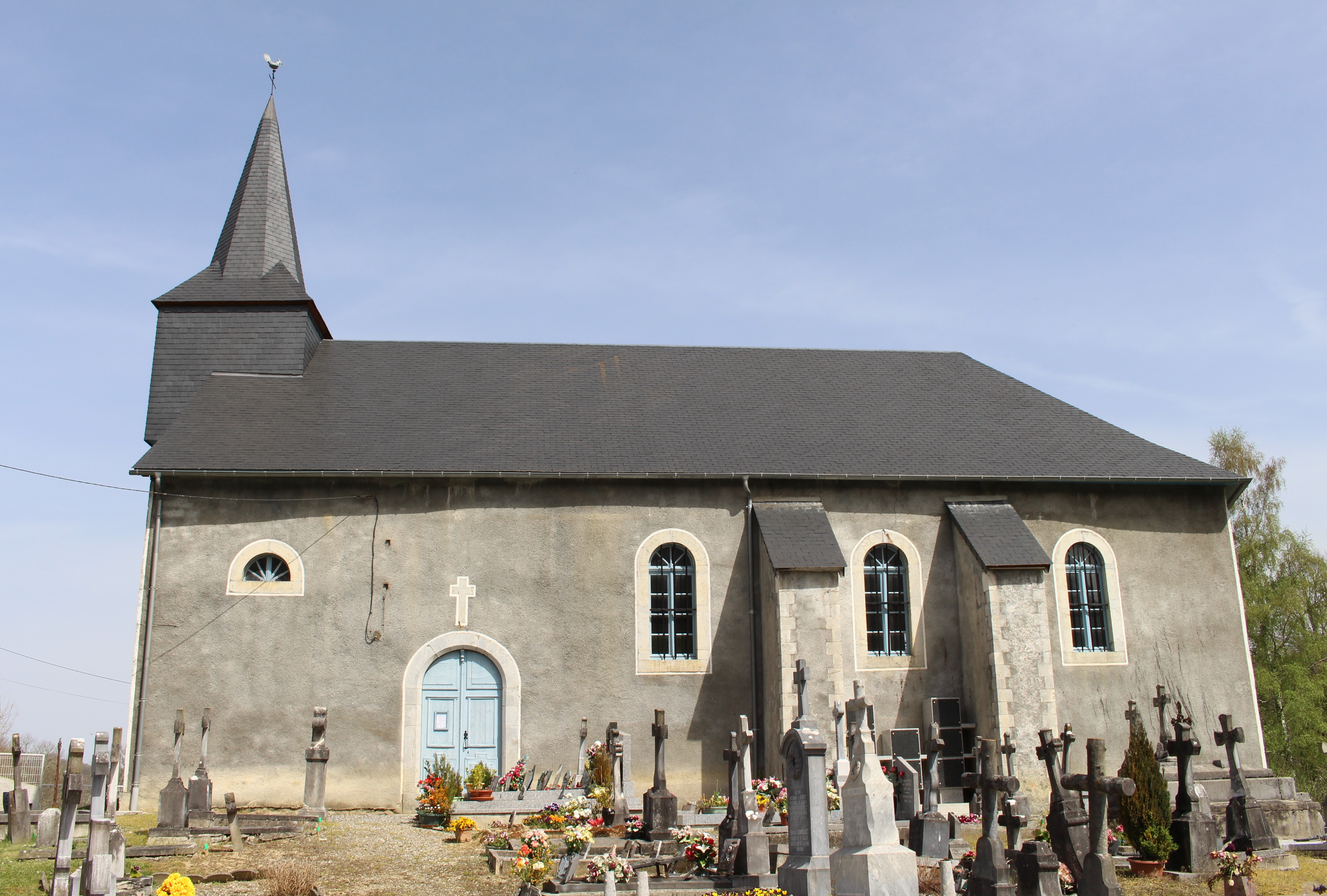 Église Saint-Pierre de Lomné (Hautes-Pyrénées)